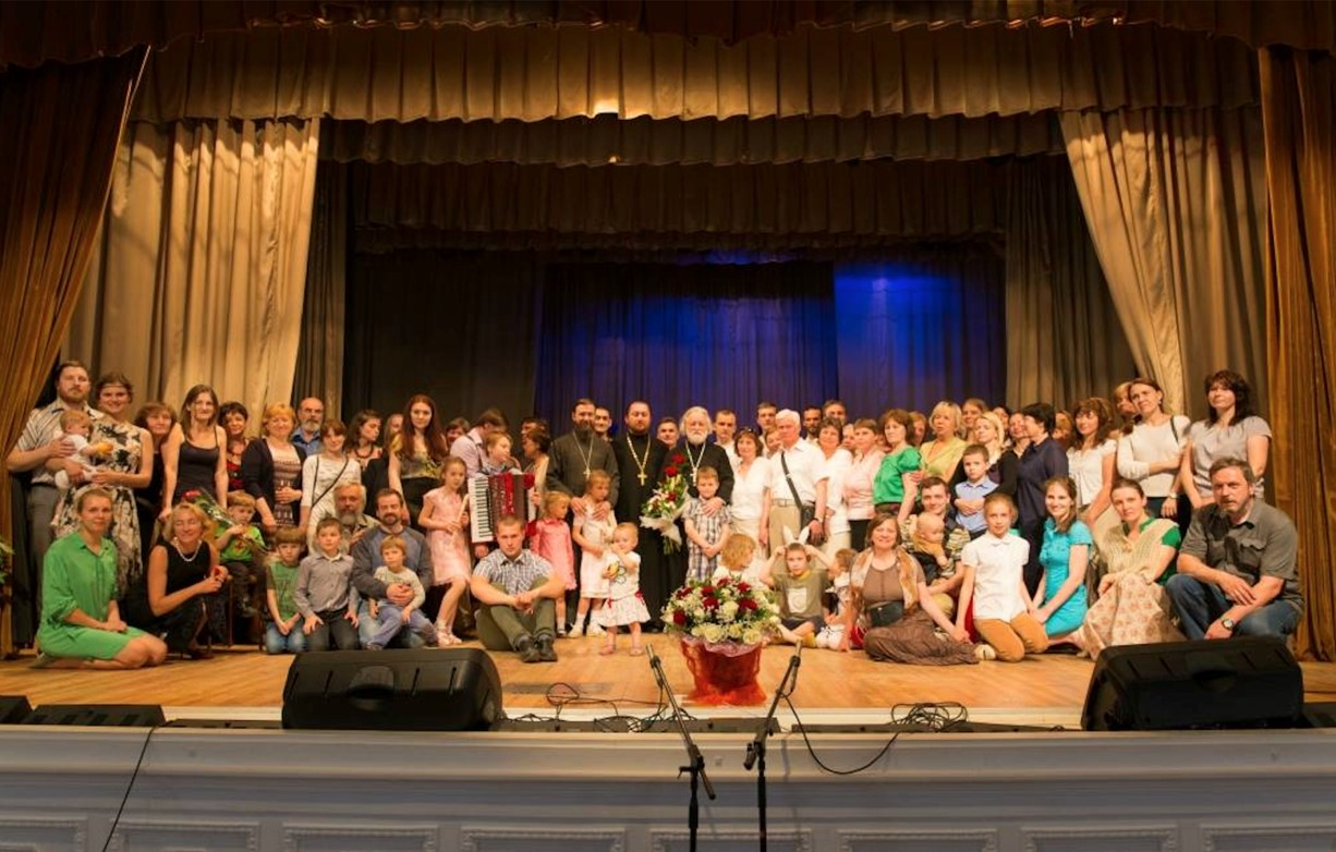 Ежегодно участники семейных клубов трезвости встречаются на творческих концертах, организованных силами клубного